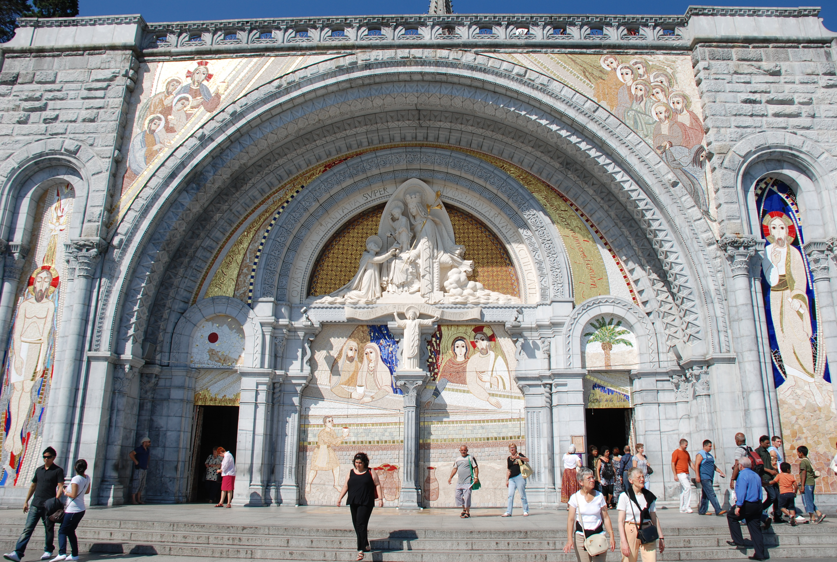 Entrée de la basilique du Rosaire. Les mosaïques de style byzantin ont été restaurées pour le bicentenaire des Apparitions.